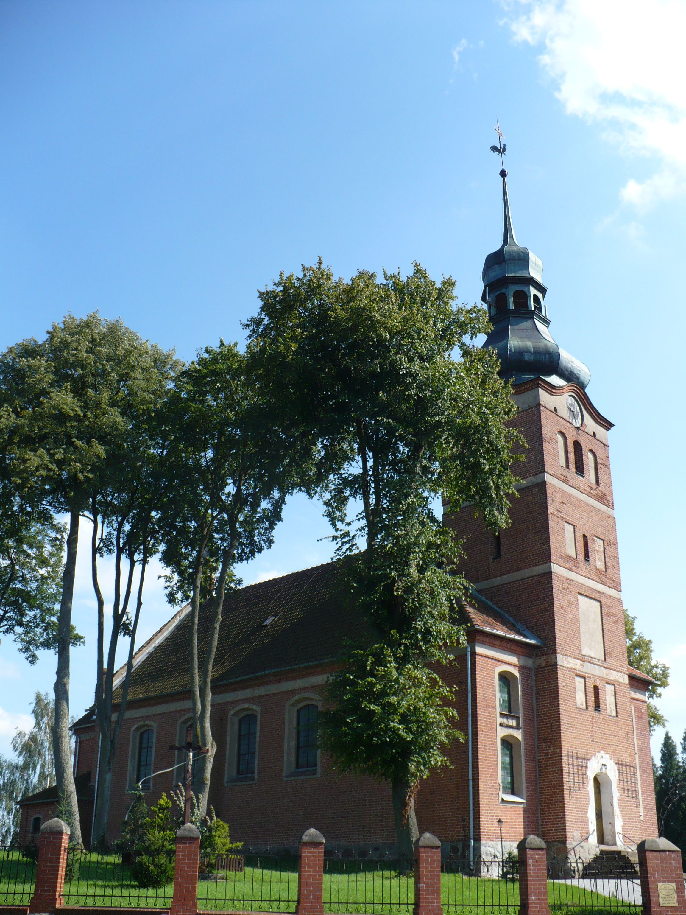 Barokowy kościół z 1730 roku w miejscowości Ramsowo (zabytek nr rejestr. A-835)